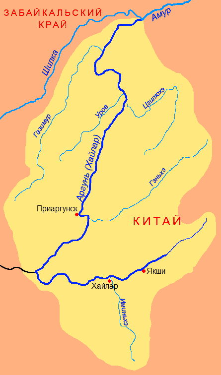 Схема бассейна Аргуни